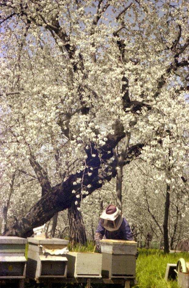 Sotto i ciliegi, sono disposte delle arnie per l'impollinazione archivio "Gruppo Mezaluna" di Vignola